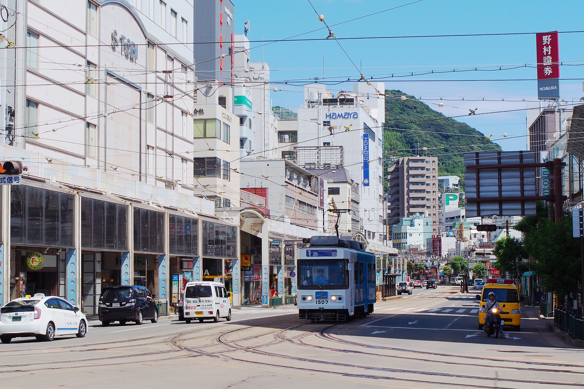 長崎市浜町の電車通り（長崎県長崎市）。※後日改訂予定です。